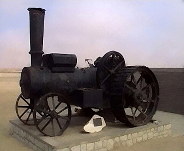 Lokomotive „Martin Luther“